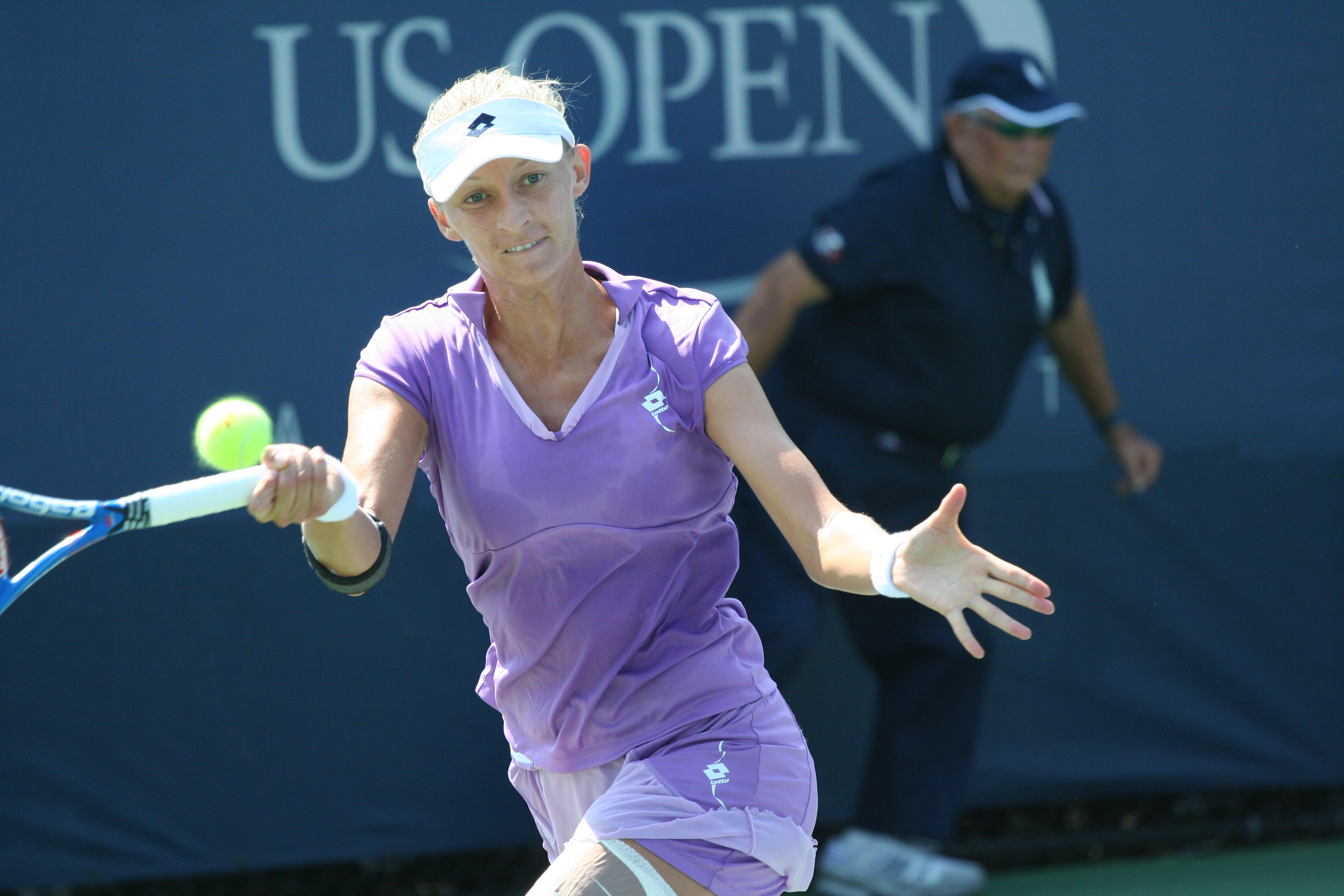 U.S. Open Aug. 31, 2010